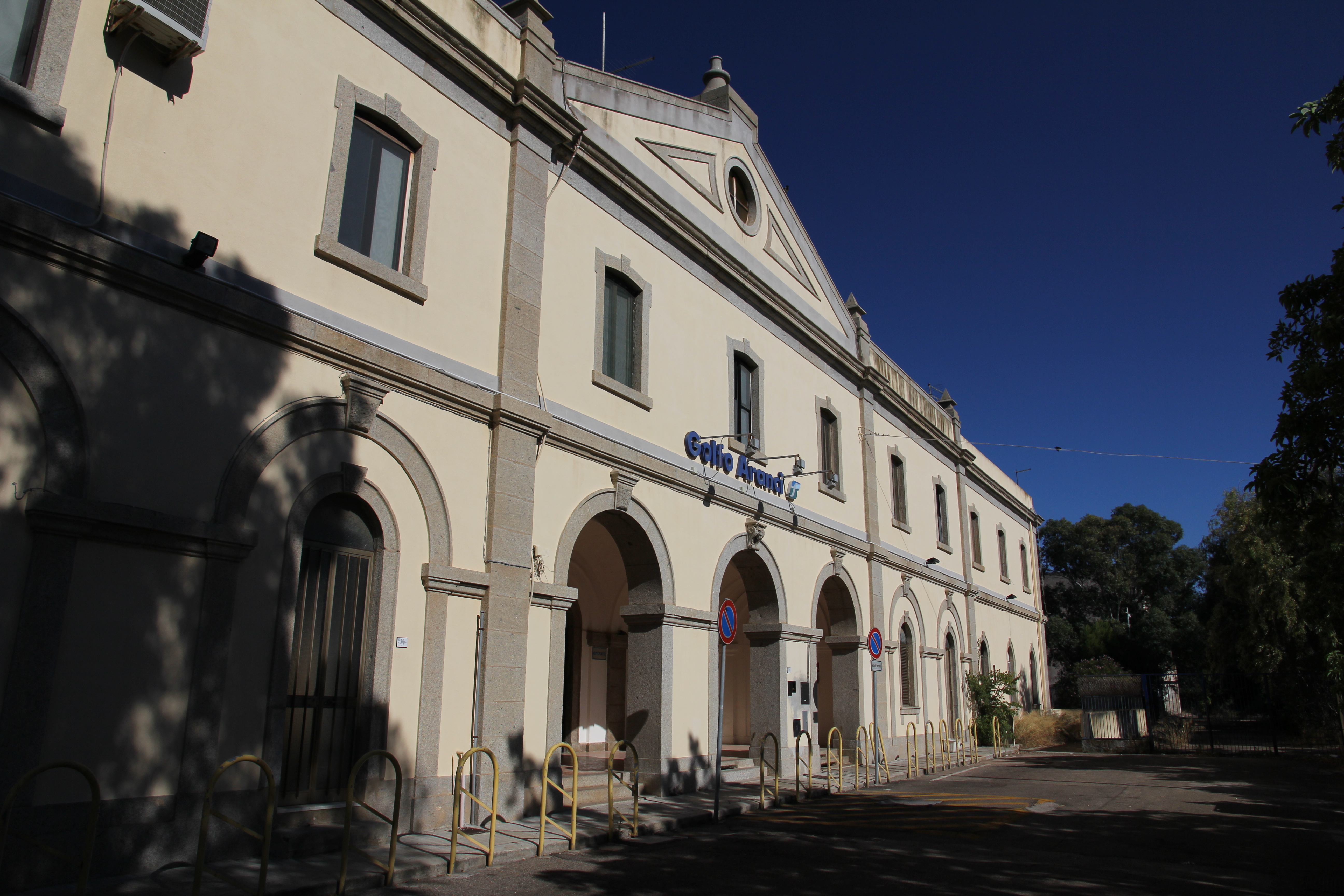 Golfo Aranci - Stazione ferroviaria